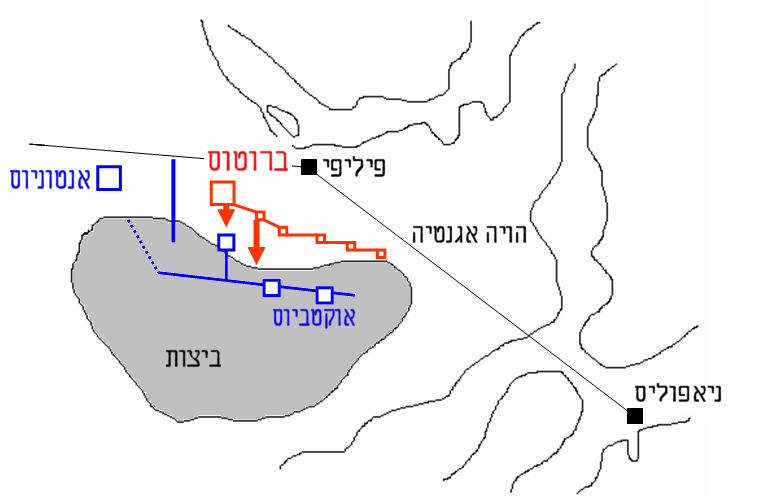 קרב פיליפי השני